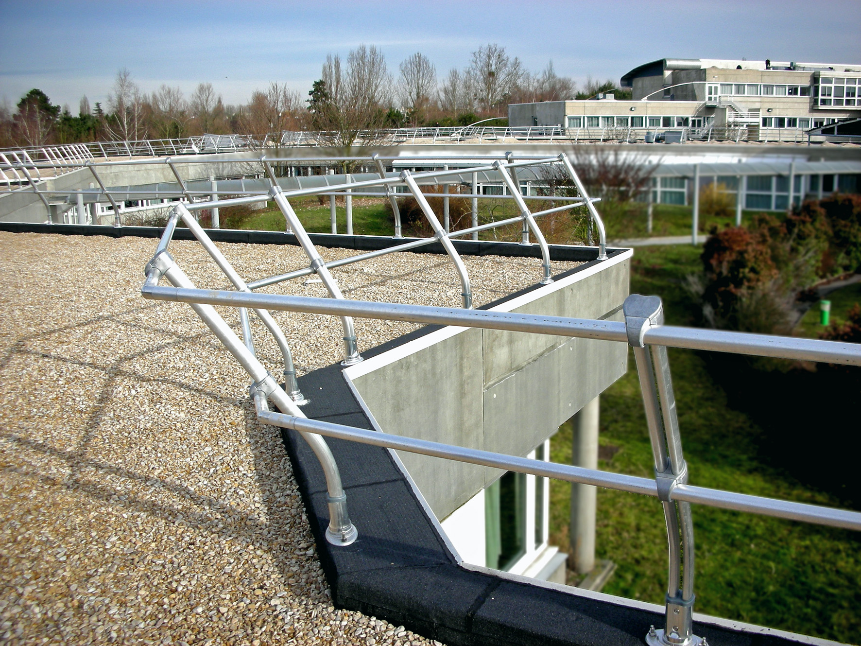 platine de fixation H